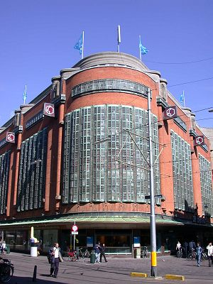 Grands magasins De Bijenkorf à La Haye